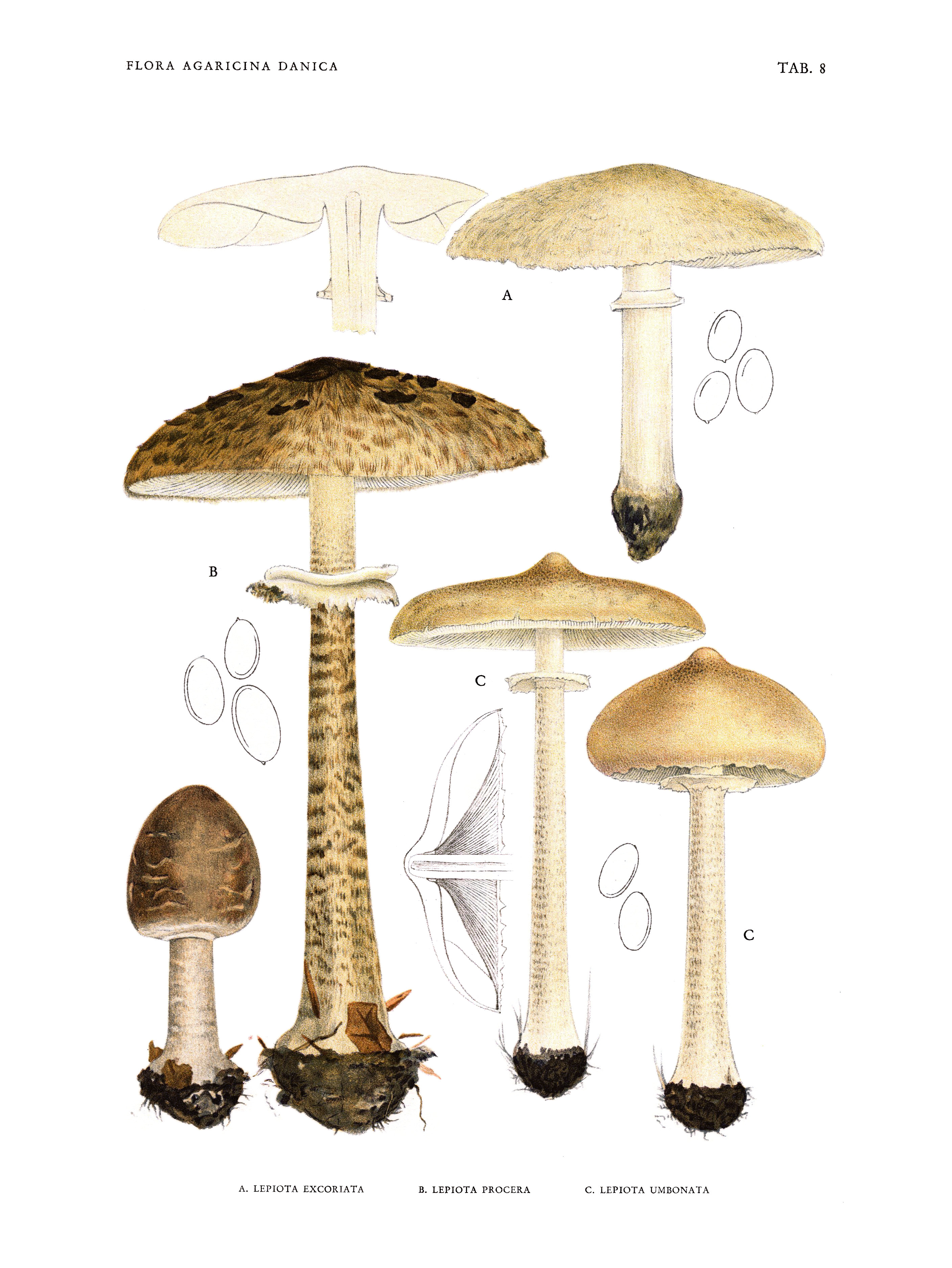 Jakob E. Lange: Flora agaricina Danica. Vol. 1; TAB. 8 A. Macrolepiota excoriata as Lepiota excoriata B. Macrolepiota procera as Lepiota procera C. Macrolepiota mastoidea as Lepiota umbonata